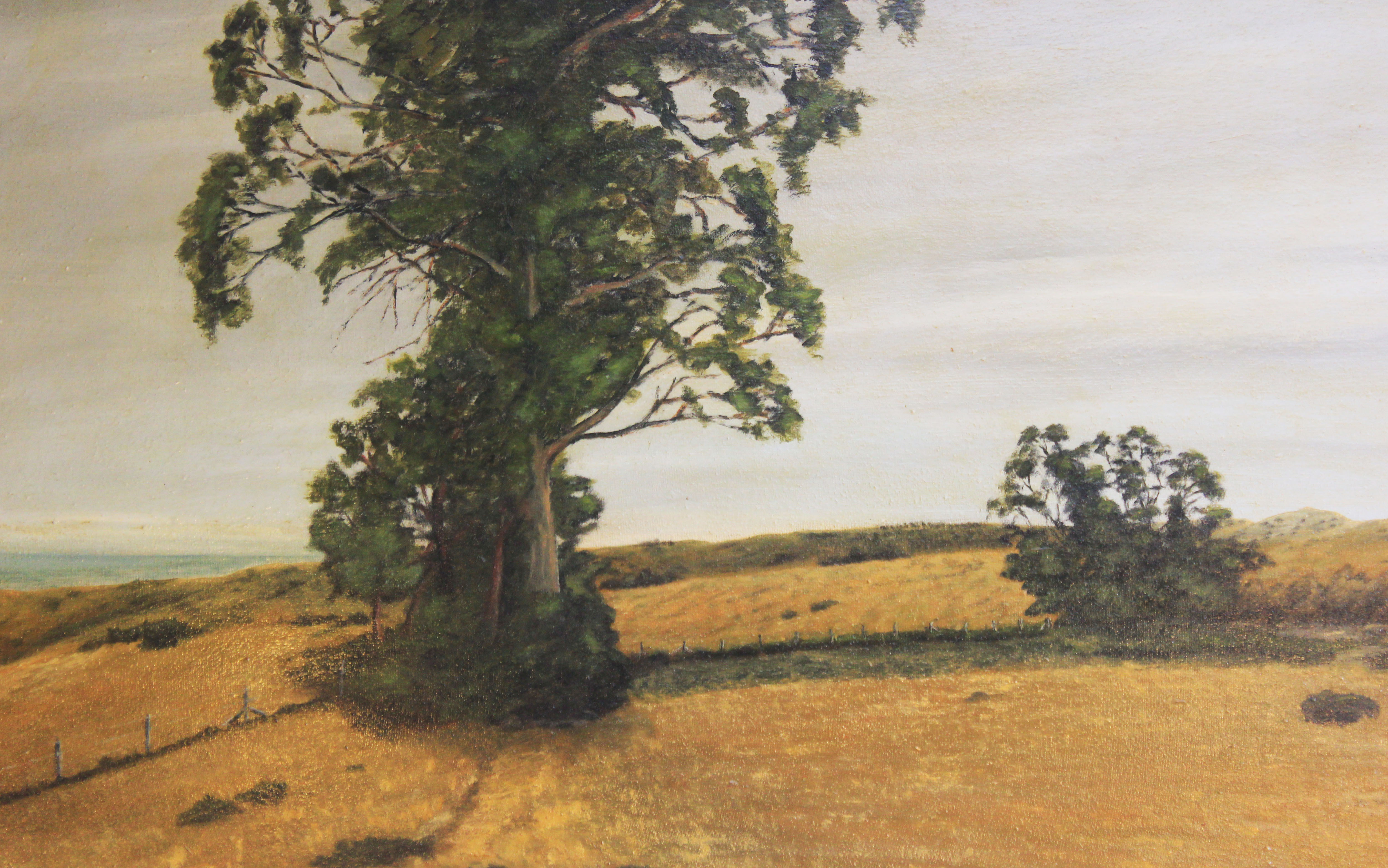 Pintura de Eugenio Cruz Vargas (1923 - 2014). Técnica: óleo sobre tela. Tema: Bucalemu (“bosque grande”, en legua de la etnia mapuche). Localidad de costa ubicada a 237 km al sur de Santiago, la capital chilena. Posee una laguna donde es común encontrar cisnes de cuello negro. La abundante pesca de merluza y jaibas y un mar calmo hacen del lugar un buen destino turístico alternativo. Medidas: 60 x 120 cm. Autora de la fotografía: Liliana Fuentes quien, por el consentimiento acreditado del propietario titular de los derechos de autor de la obra, publica esta fotografía en internet bajo la Licencia de CC BY-SA 3.0.